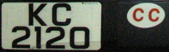 灣仔區 黃昏 愛群道 香港車牌